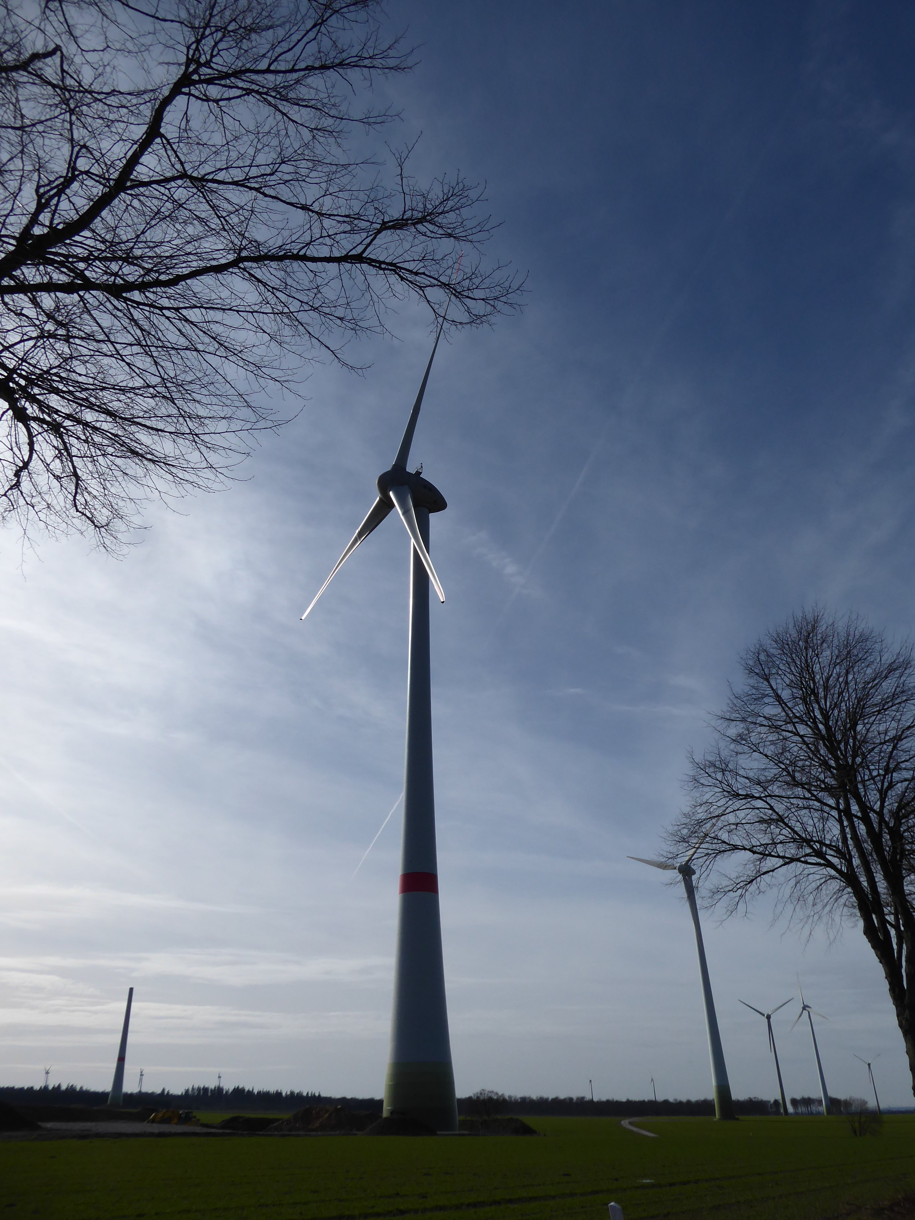 Enercon E-126 EP4 mit 4200 kW auf 135 m Nabenhöhe in Meerhof. Inbetriebnahme Dezember 2016.